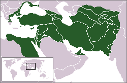 Achaemenid Empire ca. 500 BCE.